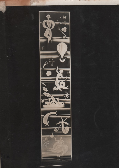 Panneau de glace gravée (scènes) présenté sur un socle en palissandre, de Pierre Lardin.